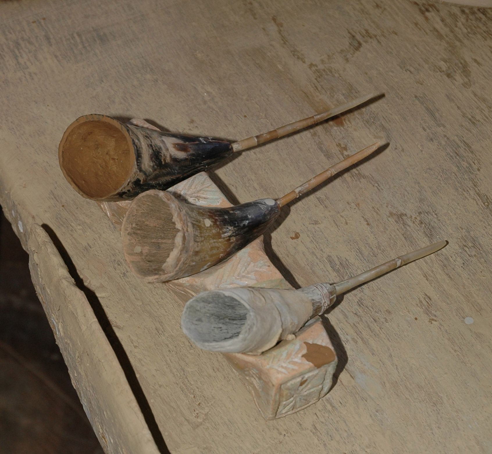 Malhörnchen aus Hurez/Rumänien, im Jahr 2006 noch im Gebrauch.